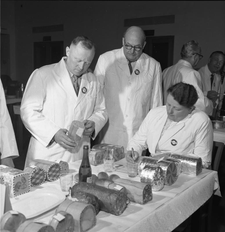 DLG Leistungsprüfung für Fleisch- und Feinkosterzeugnisse, Messe Frankfurt